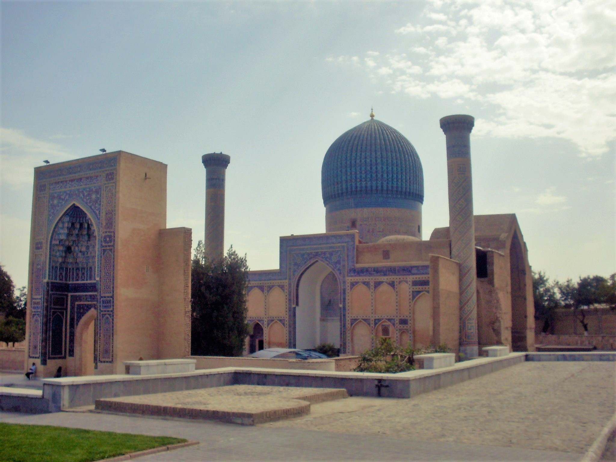 Mausoleum of Amir Temur (Gur-Emir mausoleum) мавзолей Амир Темур (мавзолей Гур-Эмир)